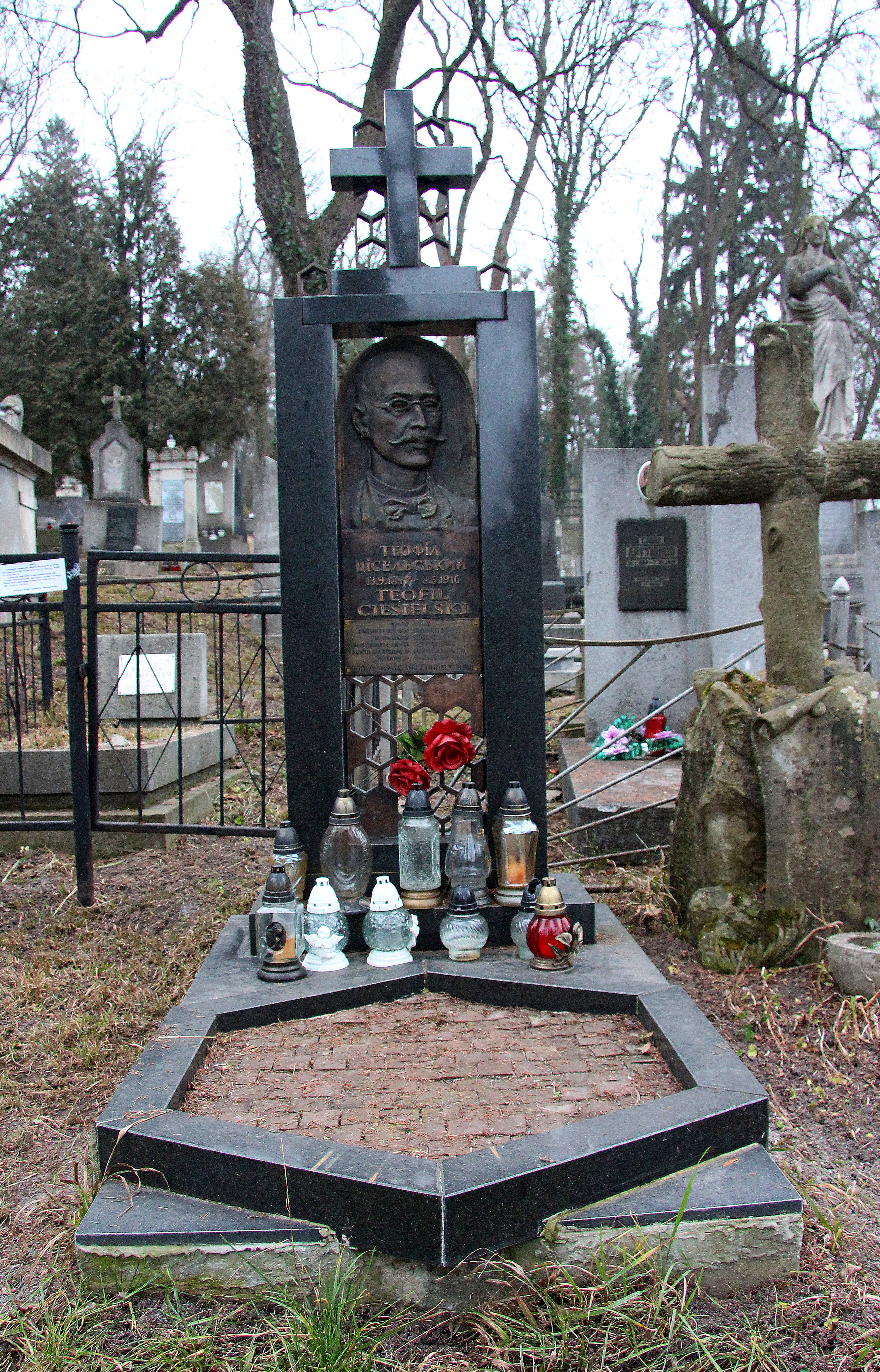 Надгробок на могилі Т. Цісельського.Личаківський цвинтар , поле № 5.